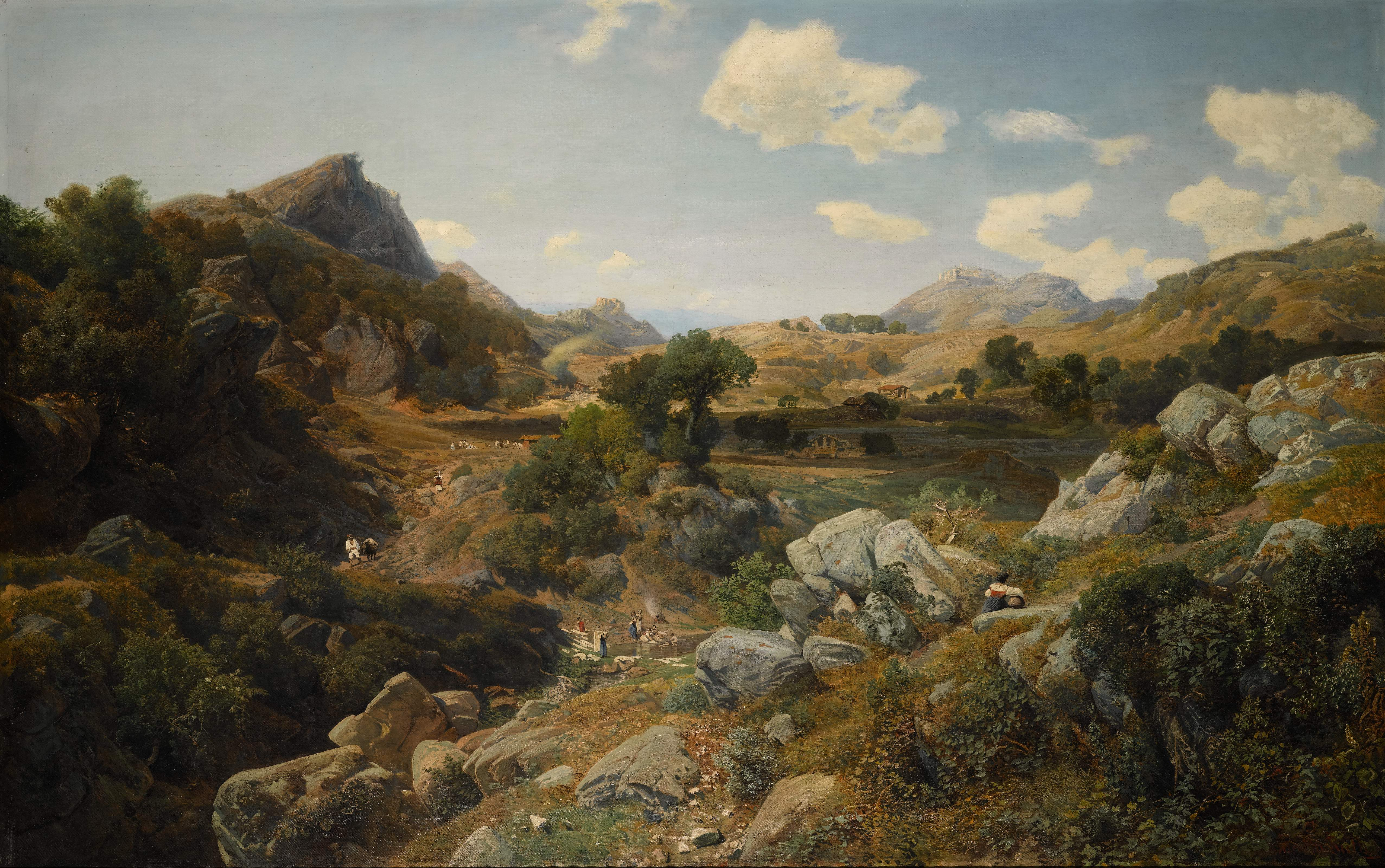 Valentin Ruths: Ziegelhütten im Sabinergebirge. Öl auf Leinwand, 100 x 158.5 cm, rechts unten signiert.